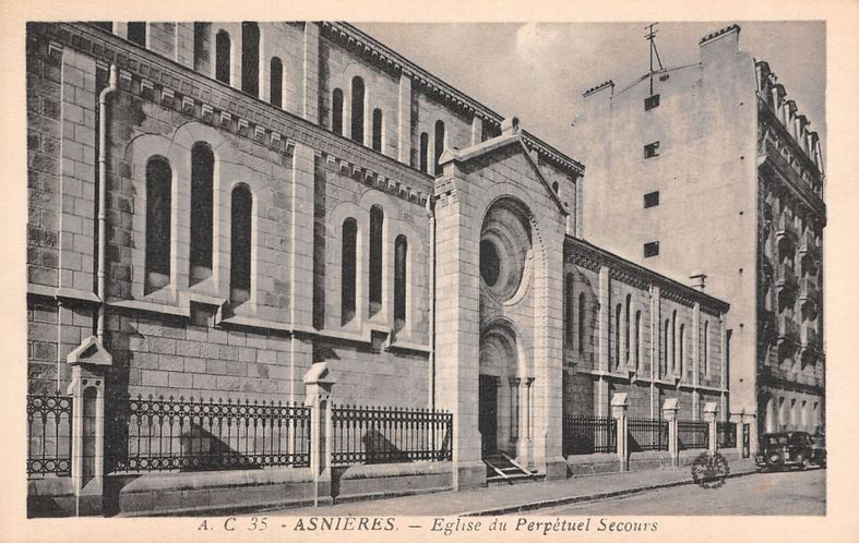 Asnieres-sur-Seine.Eglise du Perpetuel-Secours